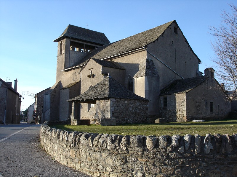 L'église de Canet-de-Salars (Aveyron)